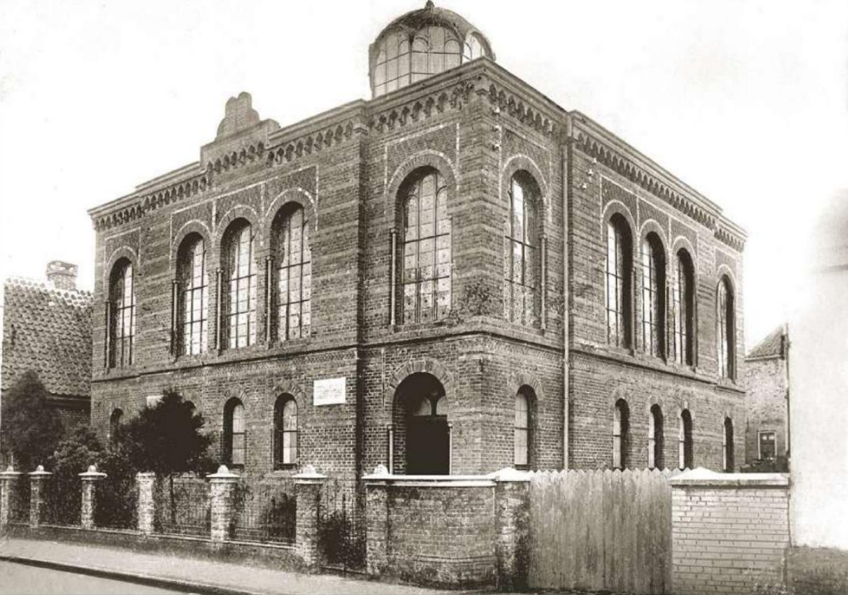 Ehemalige Synagoge in Jever; erbaut 1880. Zerstört von den Nationalsozialisten in der Pogromnacht am 9. November 1938.